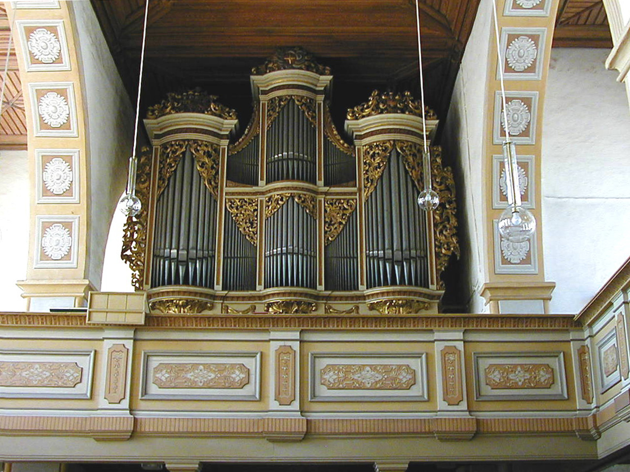 Orgel in der Georgenkirche von Rötha